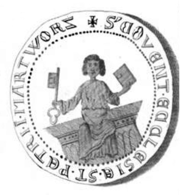 Nachzeichnung eines Abdrucks des Siegels des Zisterzienserinnenklosters St. Petri Worbis auf einer Urkunde von 1357 (Urkunde CXXVII). Randbeschriftung: S[IGILLVM] CO[N]VENT[VS] ECCLESIE S[ANC]T[I] PETRI I[N] MAR[CH]TWOR[BE]Z[E] - „Siegel des Klosters der St.-Petri-Kirche in Marktworbis“. (nach J. V. Wolf: dargestellt ist der heilige Peter einen Schlüssel in der einen Hand und ein Buch in der anderen Hand)